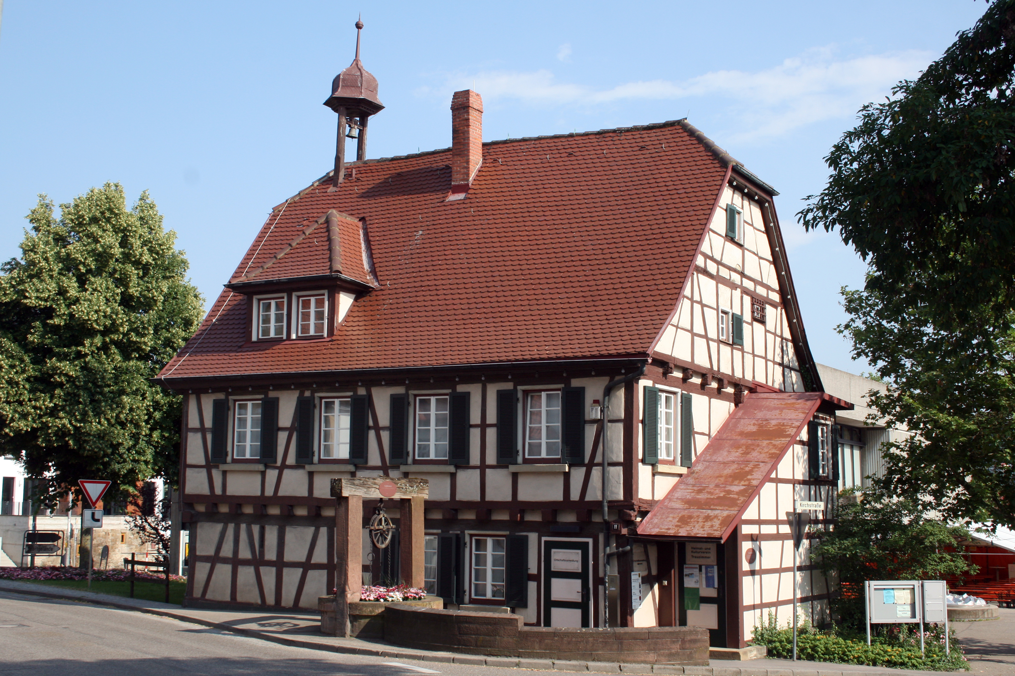 Altes Rathaus in Höfingen, Stadt Leonberg; im 16. Jahrhundert von der Gemeinde erworben, seit 1979 Heimatmuseum